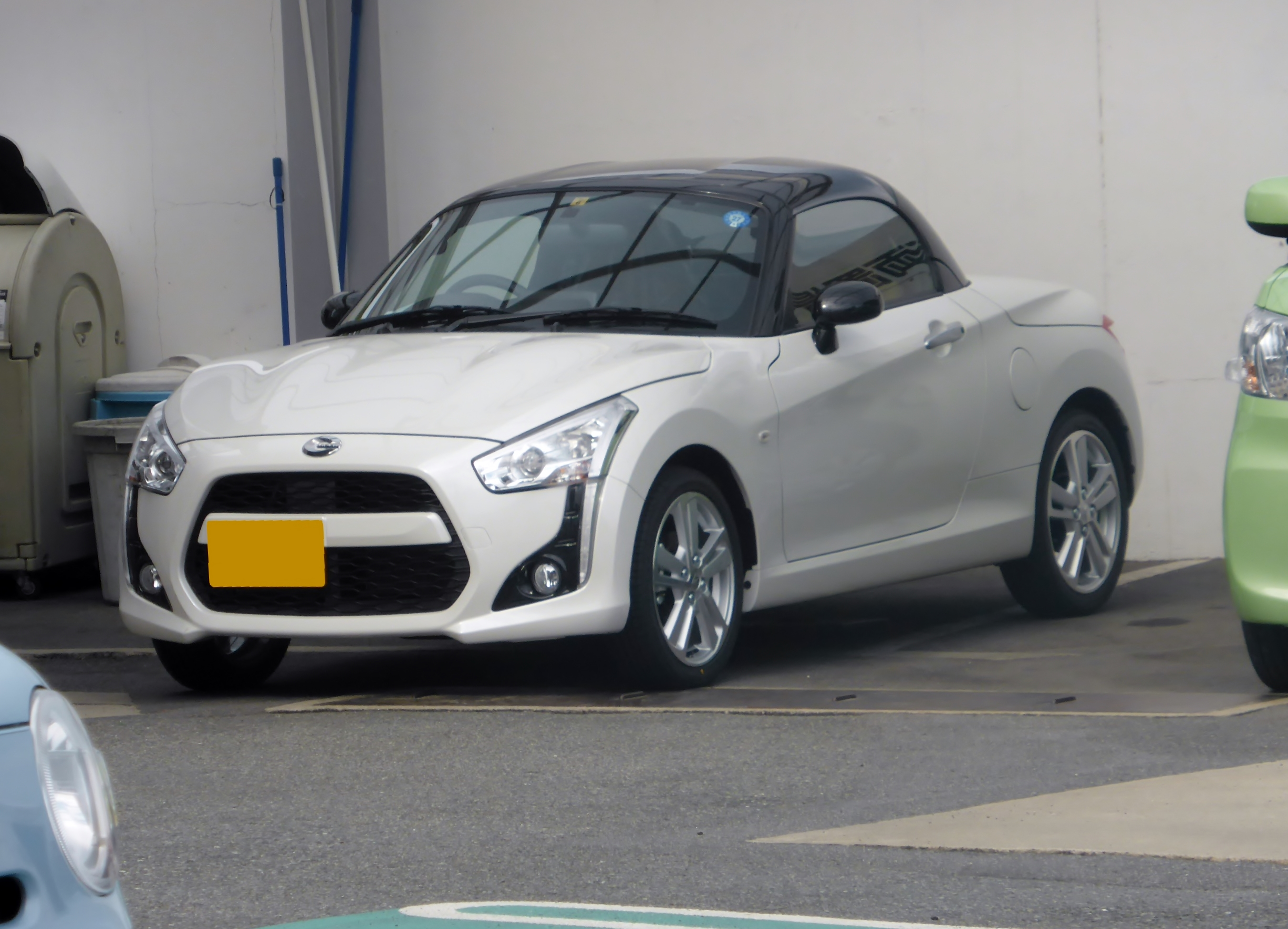 LA400K型ダイハツ・コペンローブをフロントから撮影。